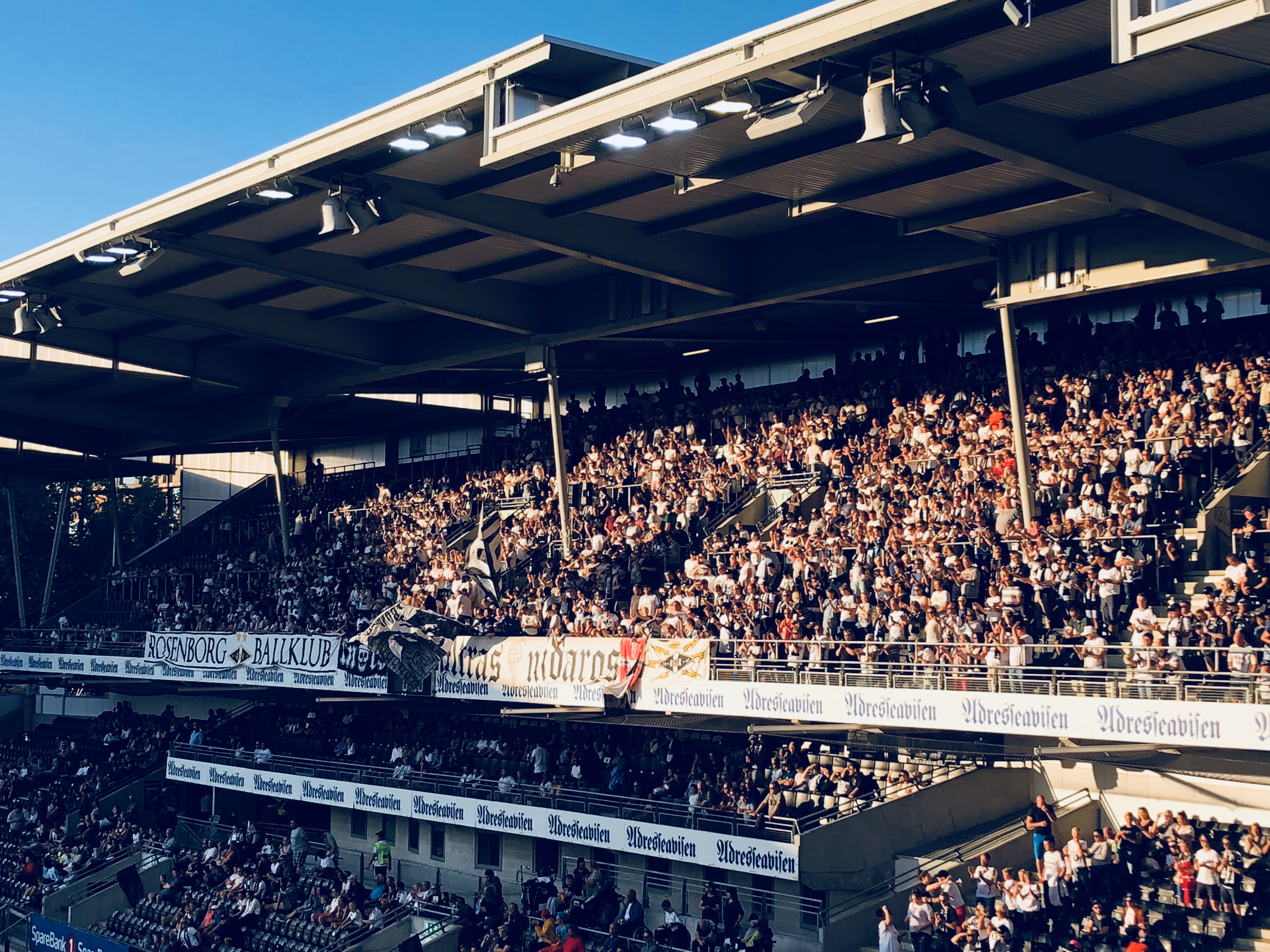 Rosenborg BK vs Celtic FC, 1. august 2018.